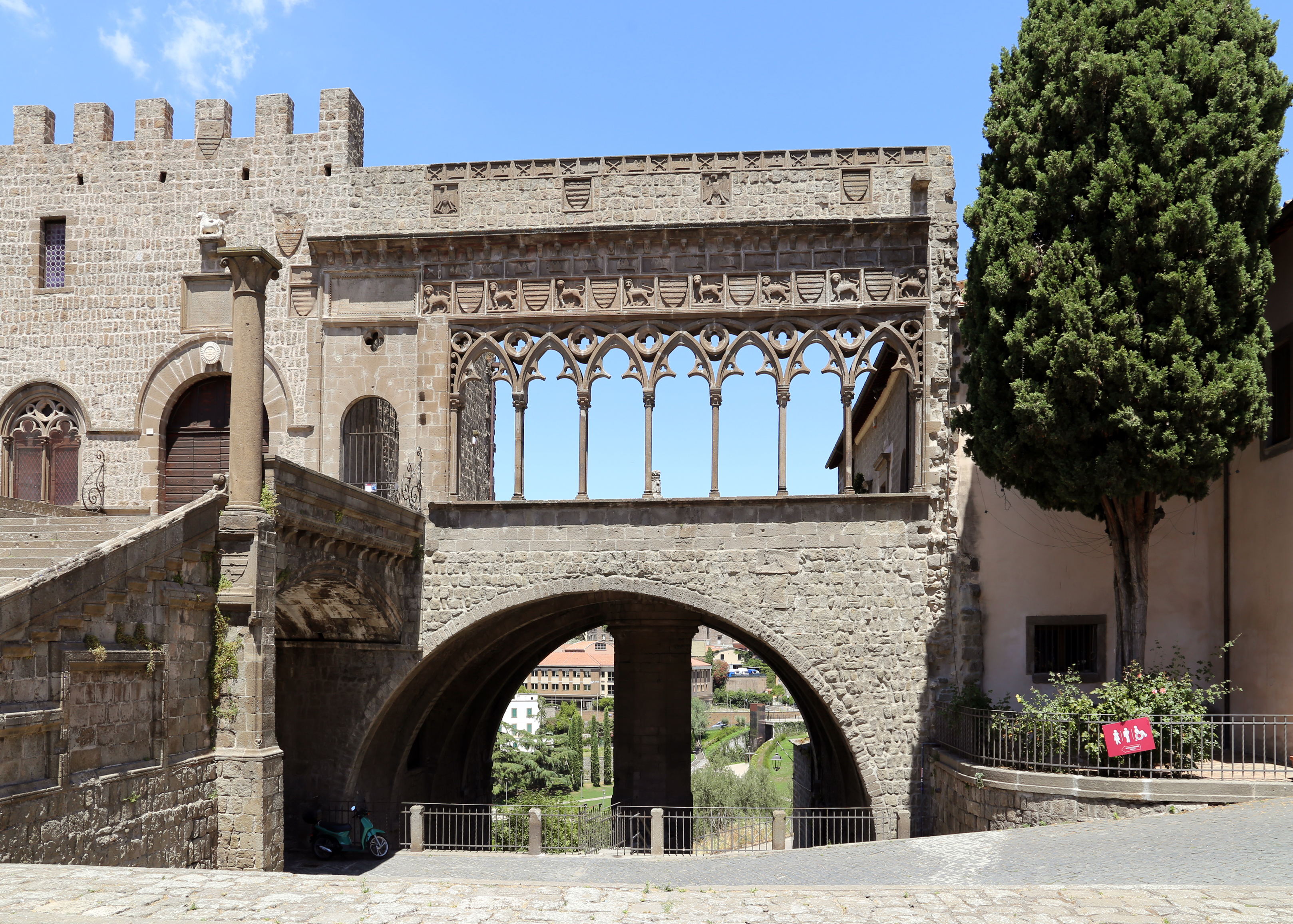 Museo del Colle del Duomo (Viterbo) - Palazzo dei Papi This is a photo of a monument which is part of cultural heritage of Italy.